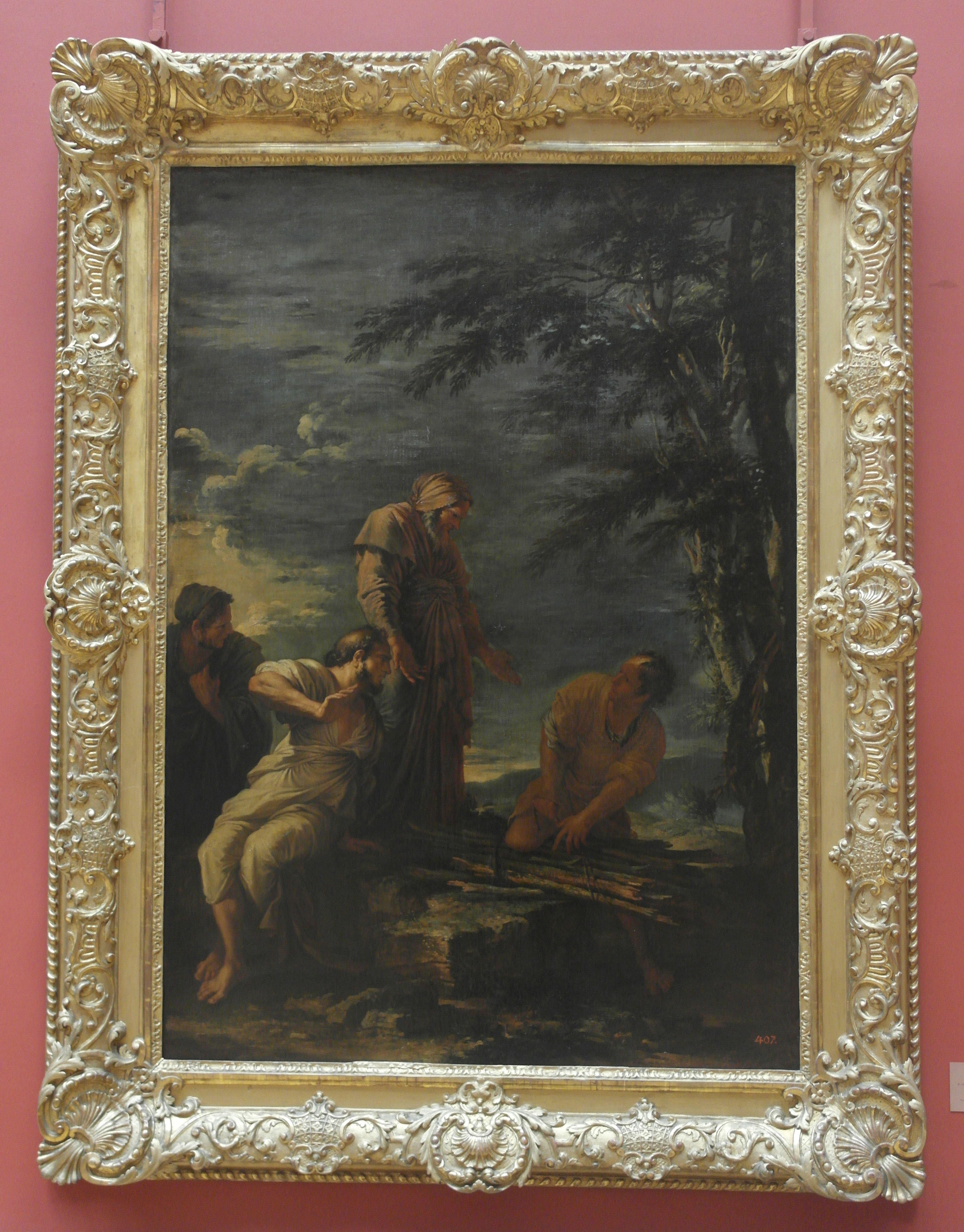 Новый Эрмитаж, зал 238 - Картина Сальватора Розы "Демокрит и Протагор"